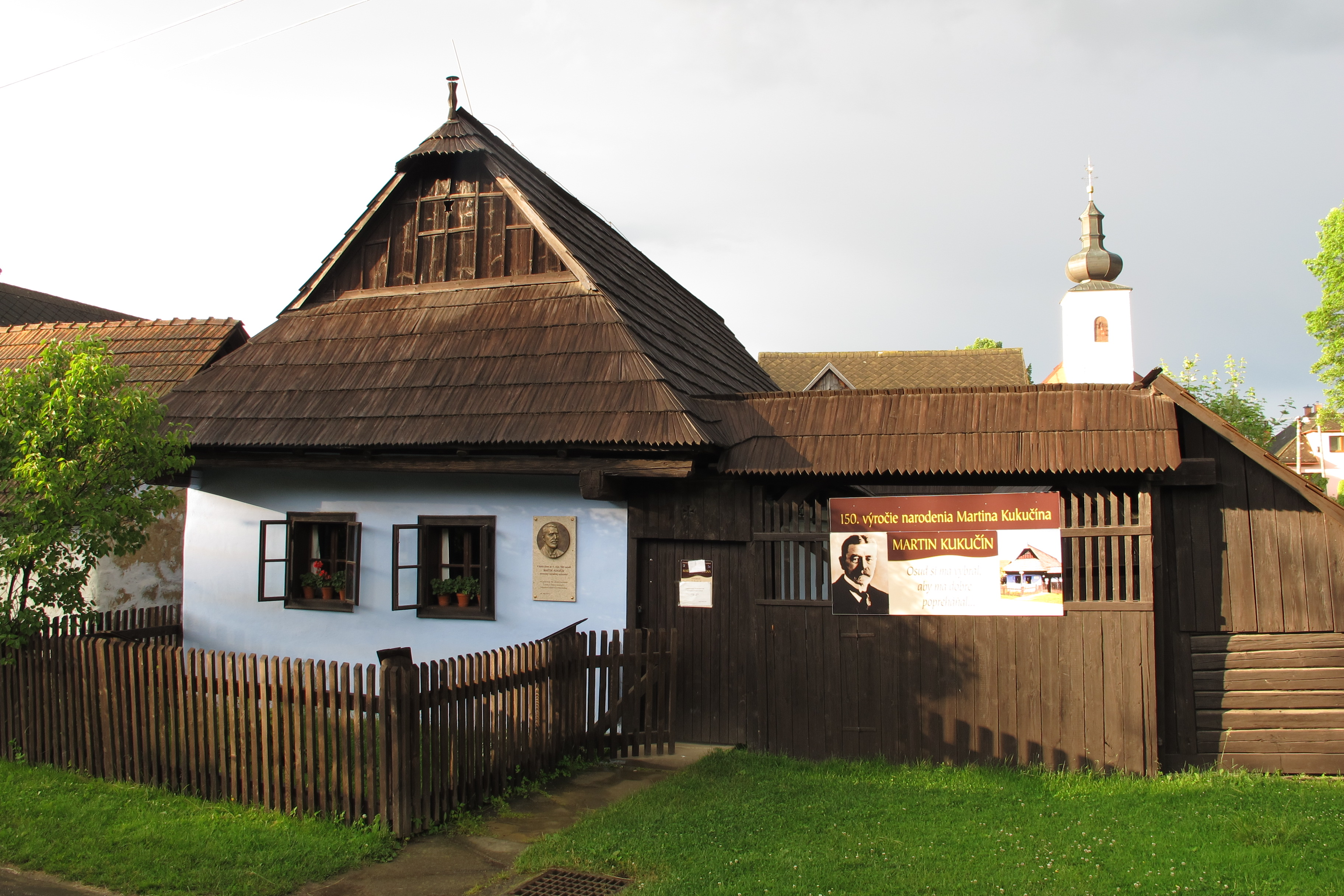 Dom ľudový pamätný